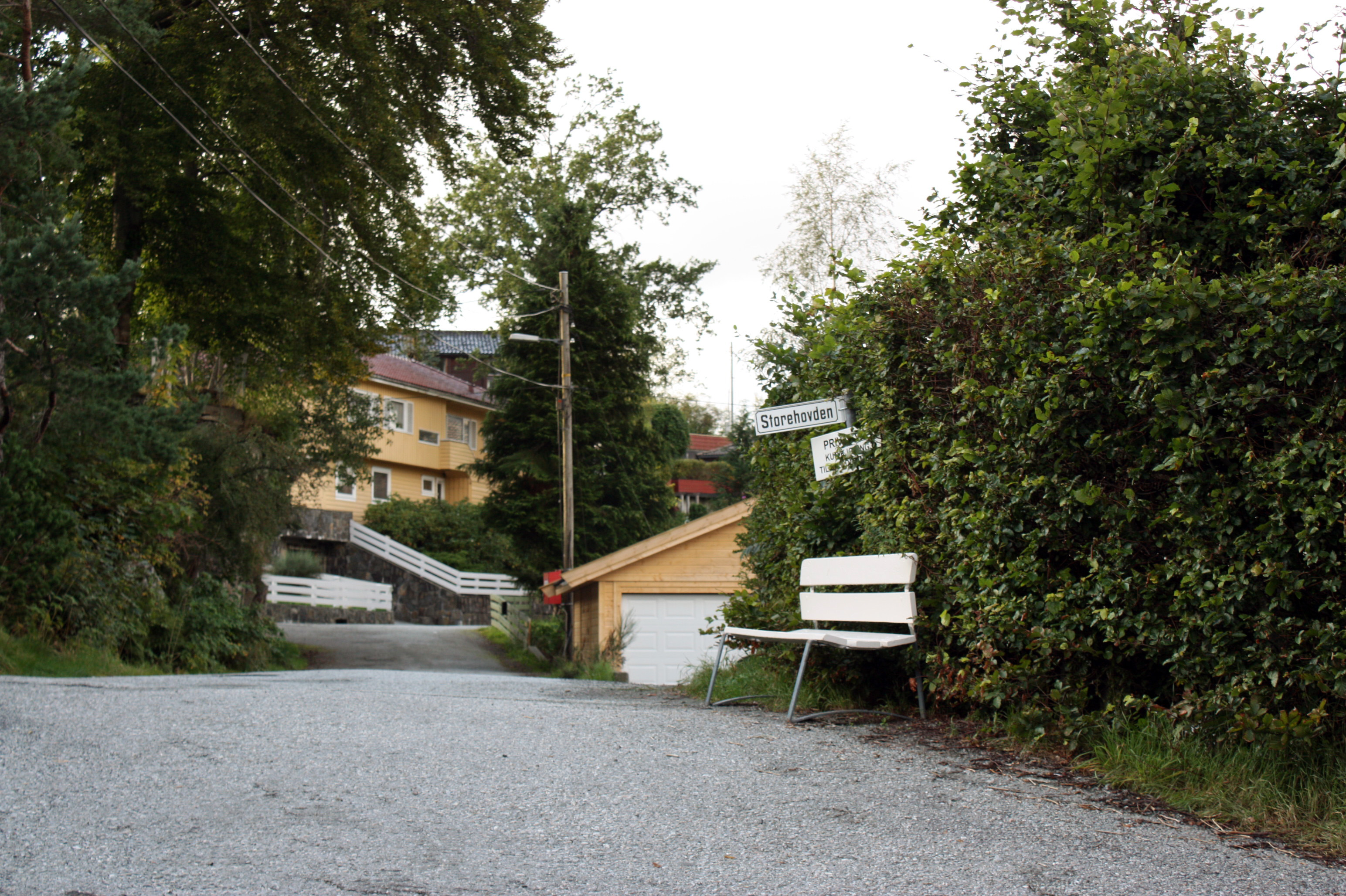 Storehovden, Fana, Bergen.